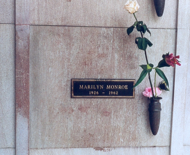 Auteur de la photographie : FC Georgio Sujet : Sépulture de Marilyn Monroe Lieu : Cimetière Westwood Memorial Park, Los Angeles, Californie, USA Année : 2003